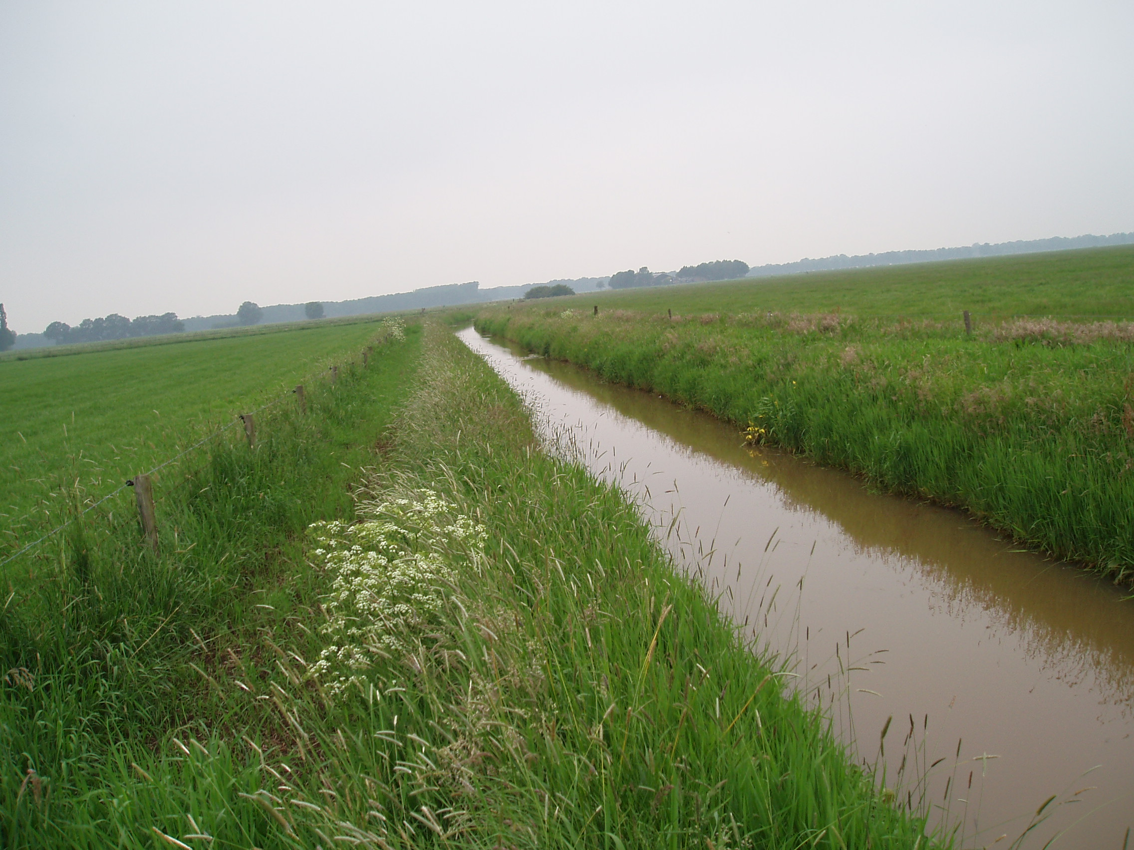 Zelfgemaakte foto. Ik heb hier geen auteursrechten opzitten.